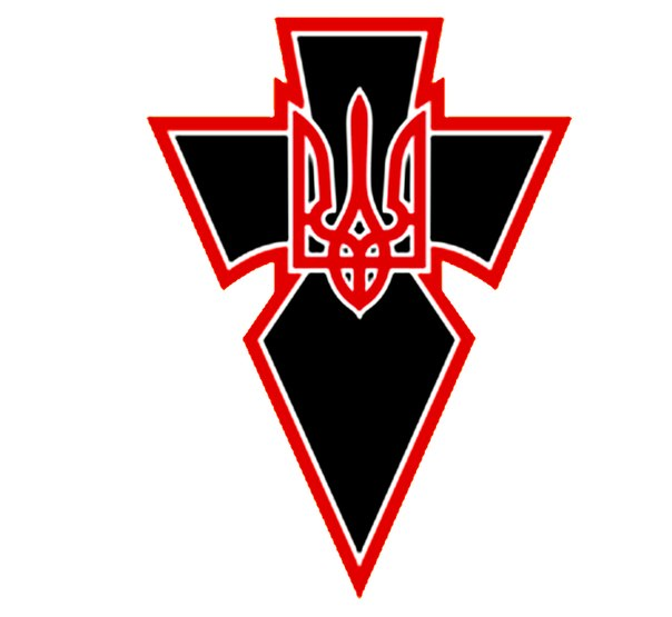 Емблема «Тризубу» імені Степана Бандери.